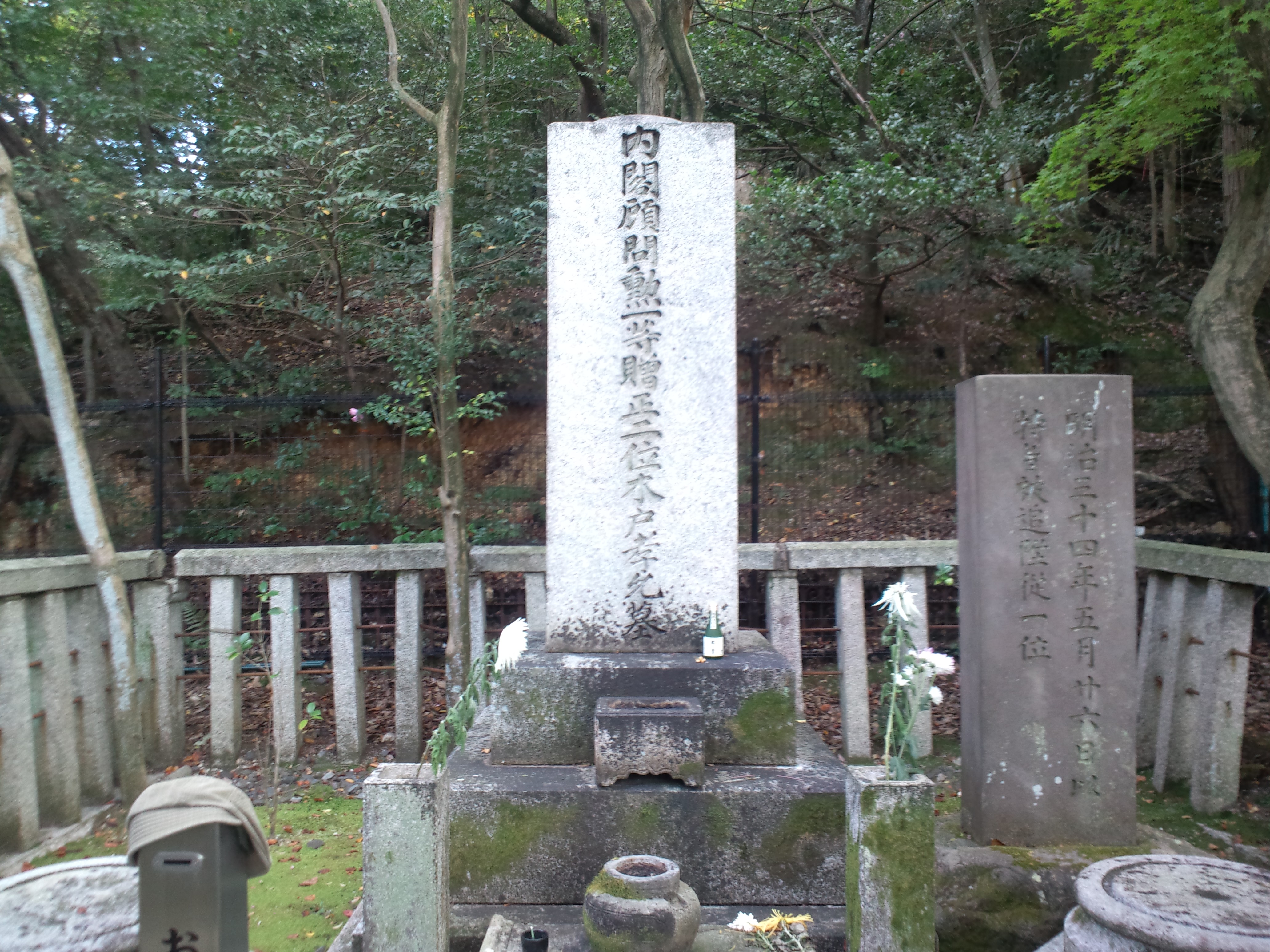 京都霊山護国神社 桂小五郎・幾松 墓所